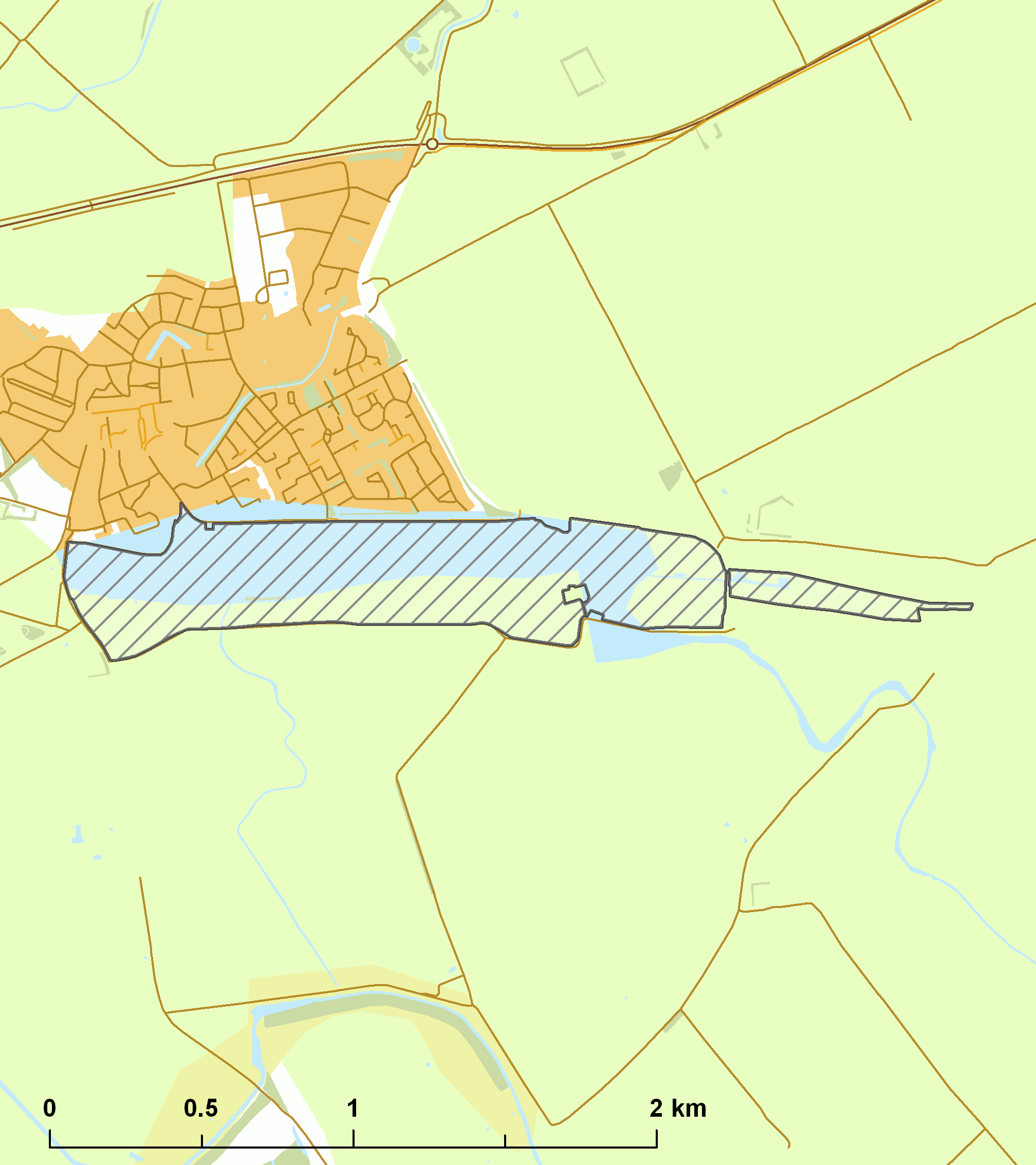 Natura2000 - Groote Gat.png